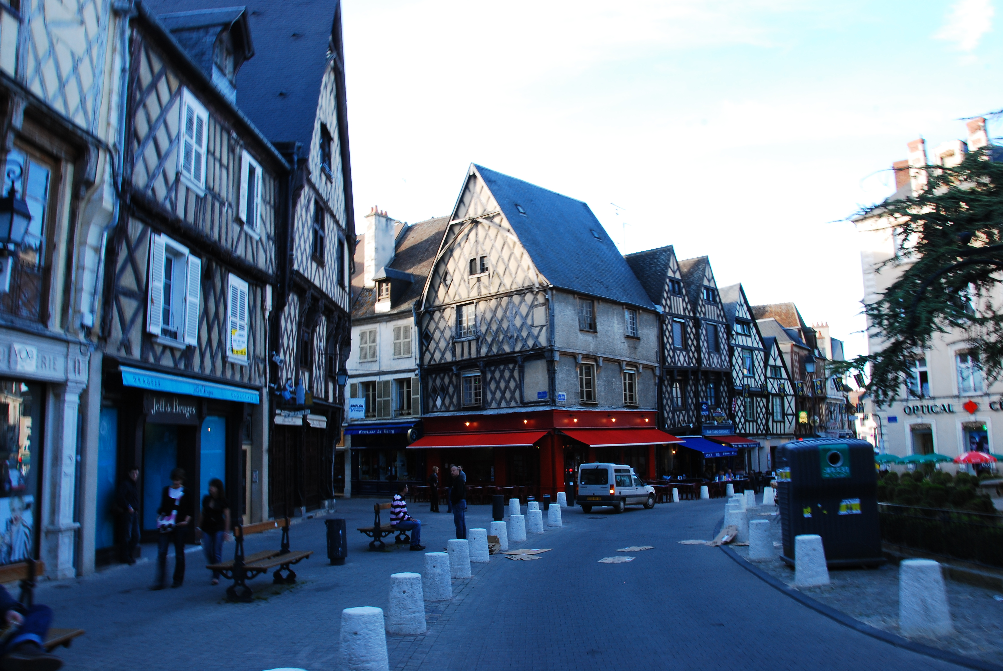 Timber framing in Bourges